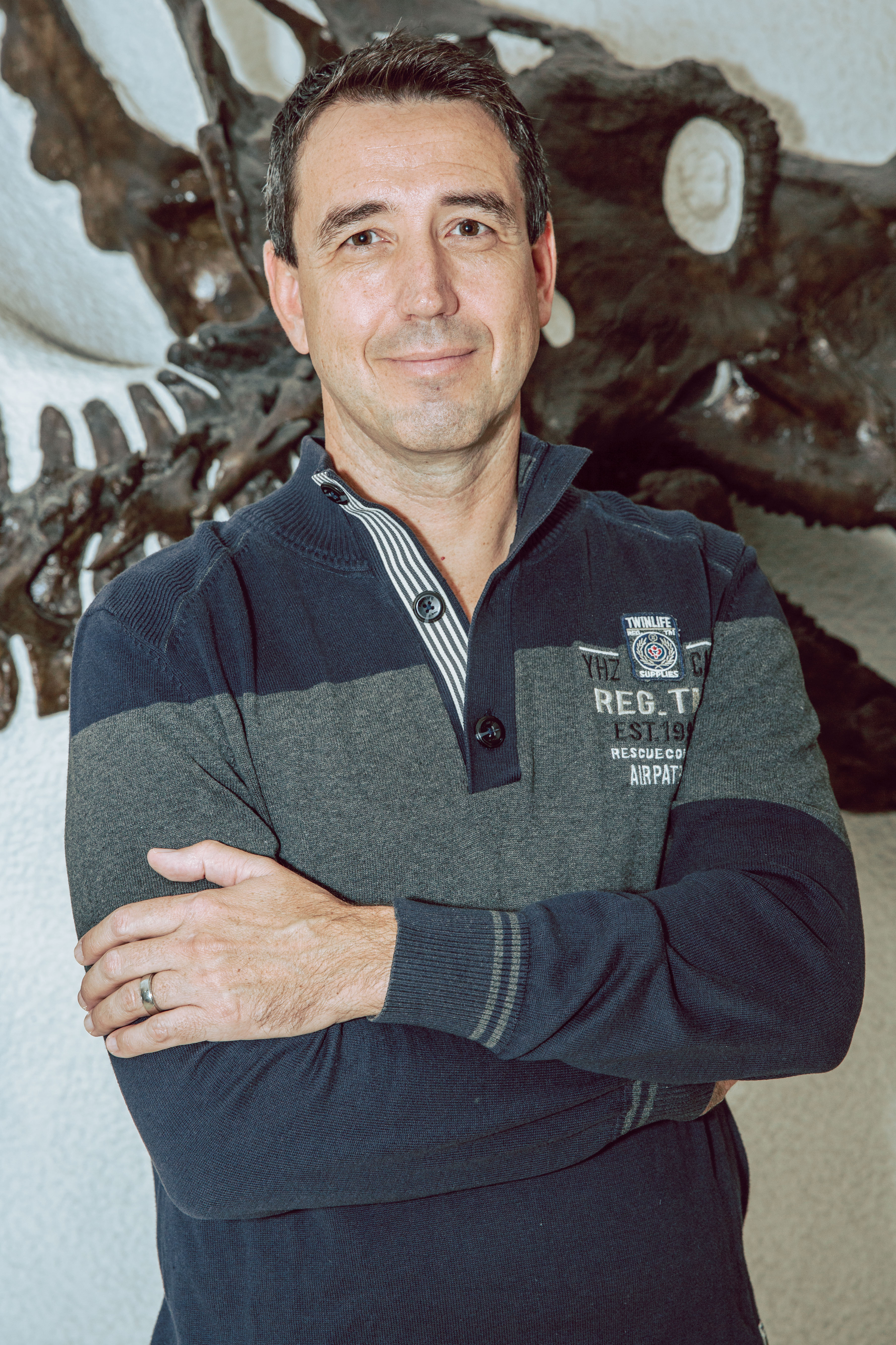 Autorenporträt Uwe LaubDepicted person: Q91466840